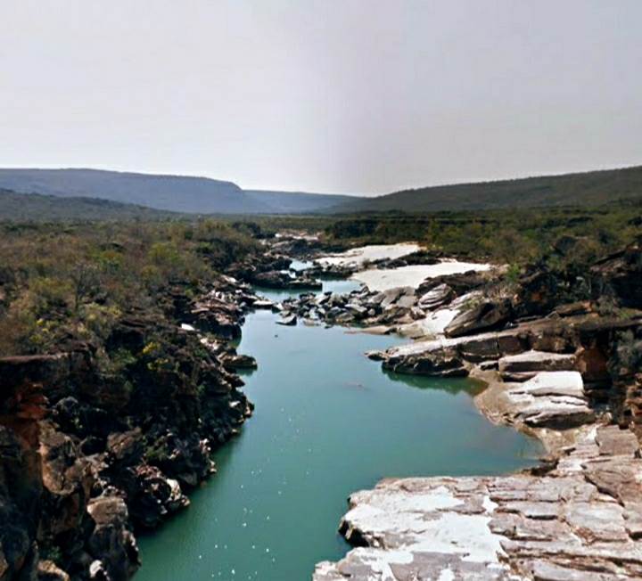 Rio Itacambiruçu, afluente do Rio Jequitinhonha, em Grão Mogol-MG